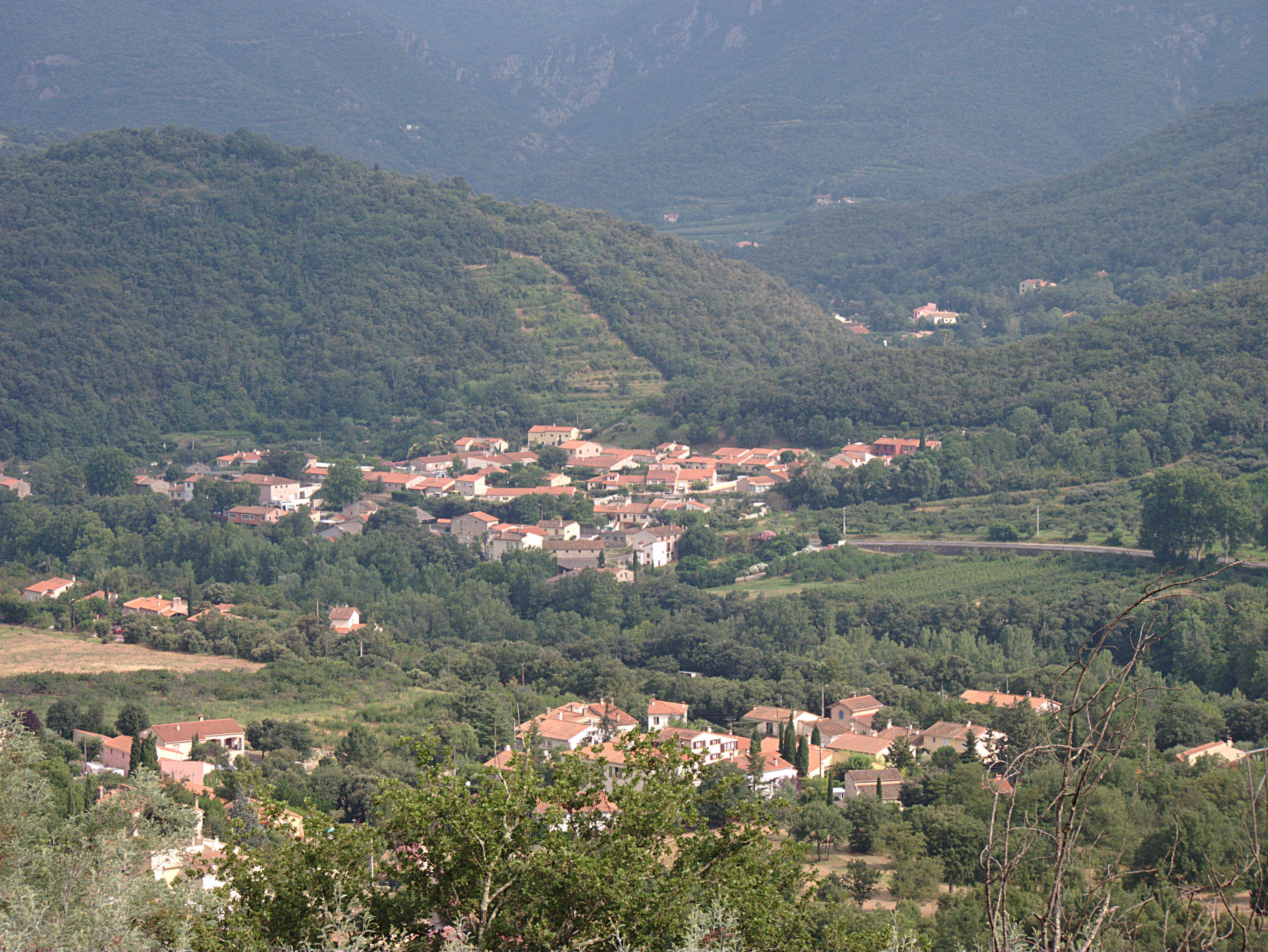 Vue générale du Pont et du Vila, Reynès (Pyrénées-Orientales, Languedoc-Roussillon, France)